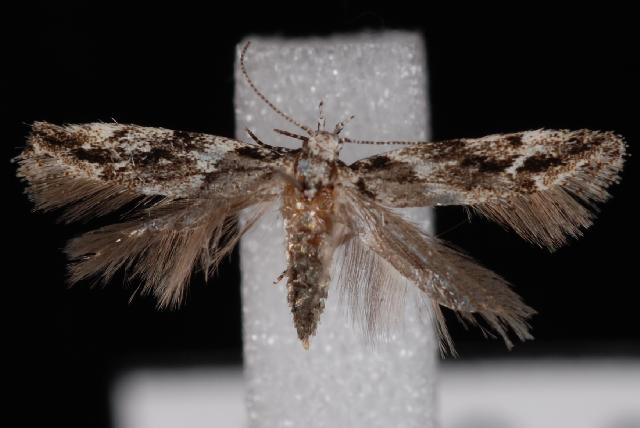 Recurvaria nanella